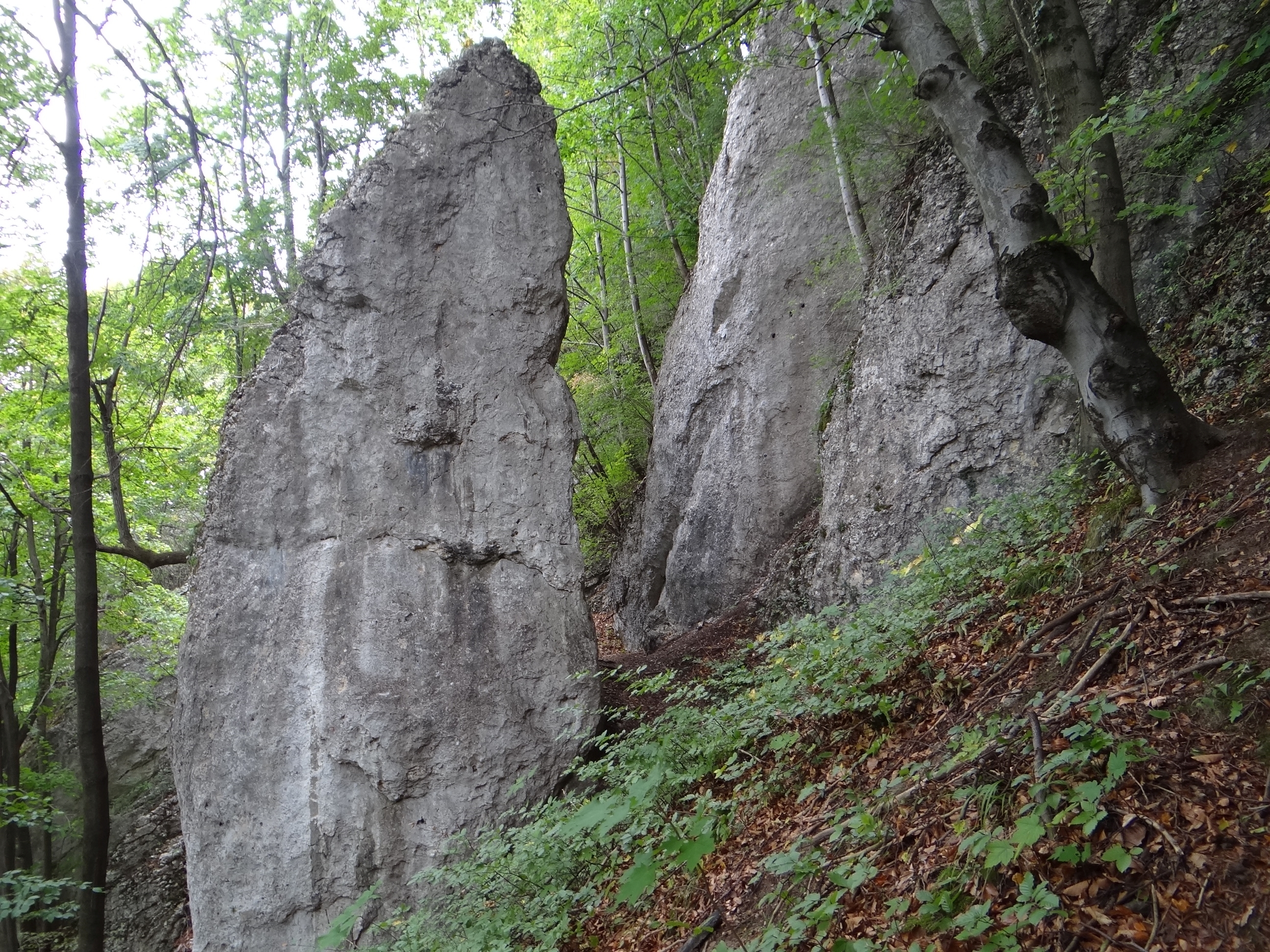 Skały Czarci Korytarz w Dolinie Będkowskiej